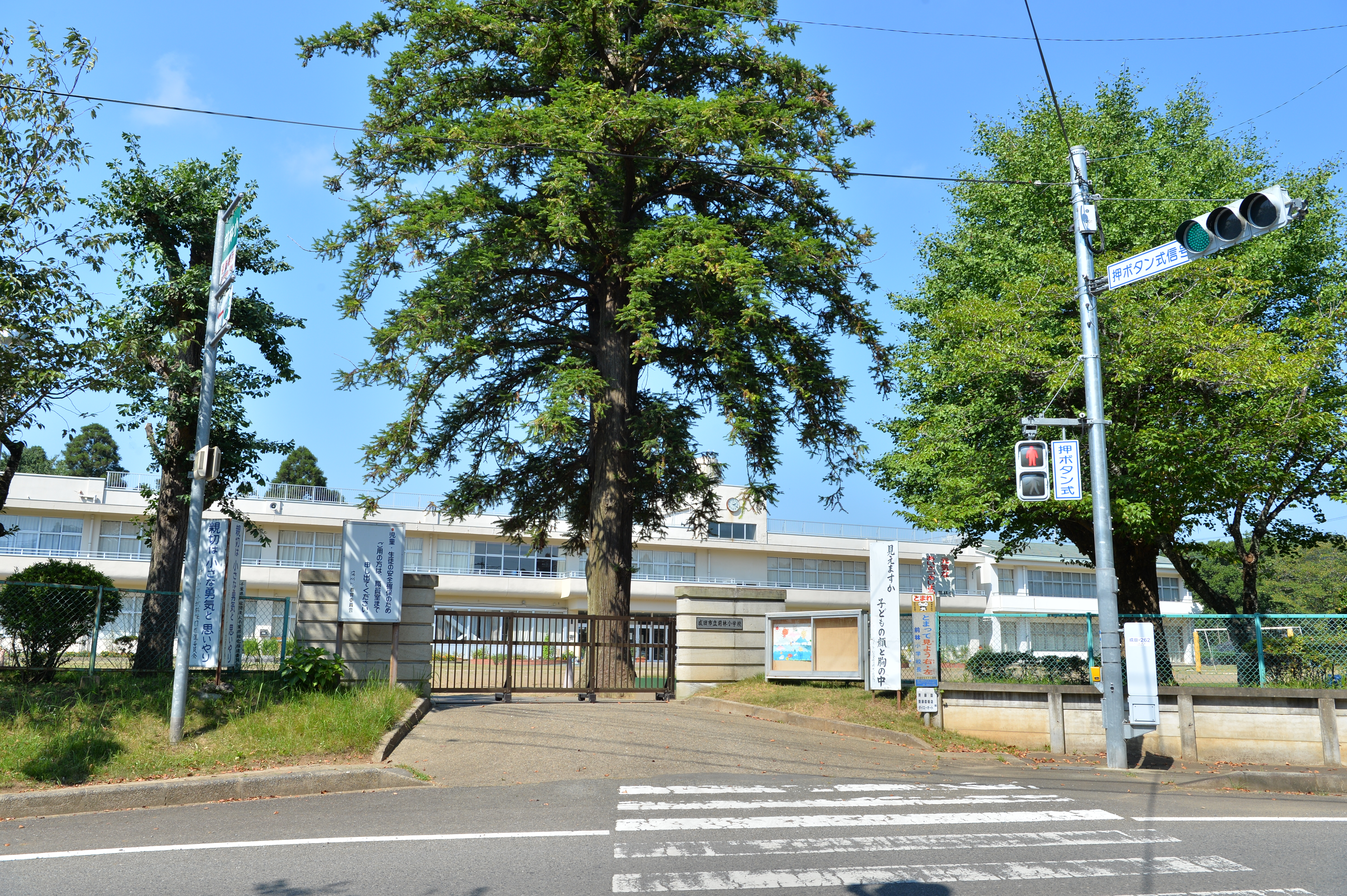 千葉県に所在する、成田市立前林小学校の正門